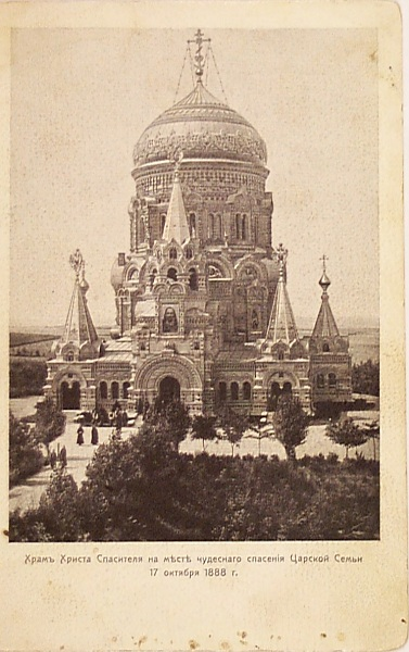 Снесённый при сов. власти Храм Христа Спасителя в Борках на месте катастрофы царского поезда 17 октября 1888 г. Вид летом.